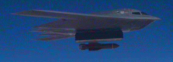 Largage d'une bombe GBU-57 par un B-2A.